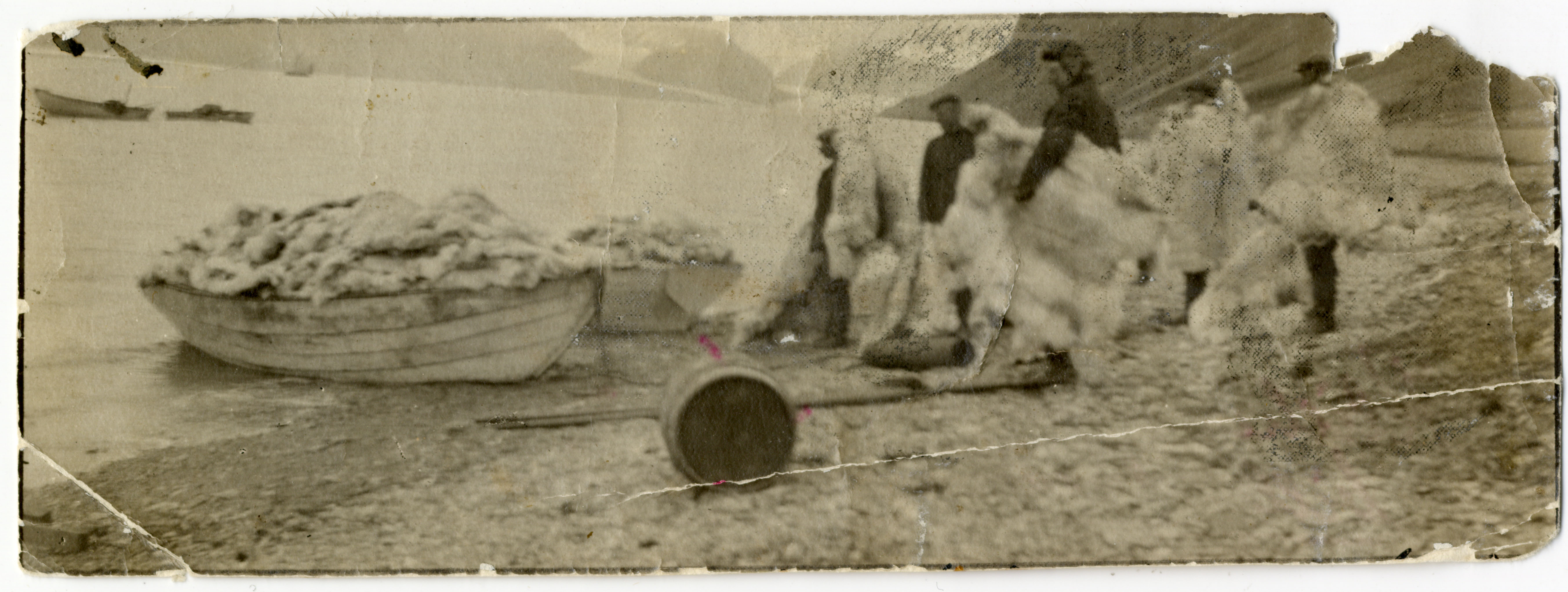 Fangstfamilien Nøis laster tidlig på 1900 tallet skinn fra isbjørner, svalbard reiner og polare rever ombord i båtene for transport til fastland Norge